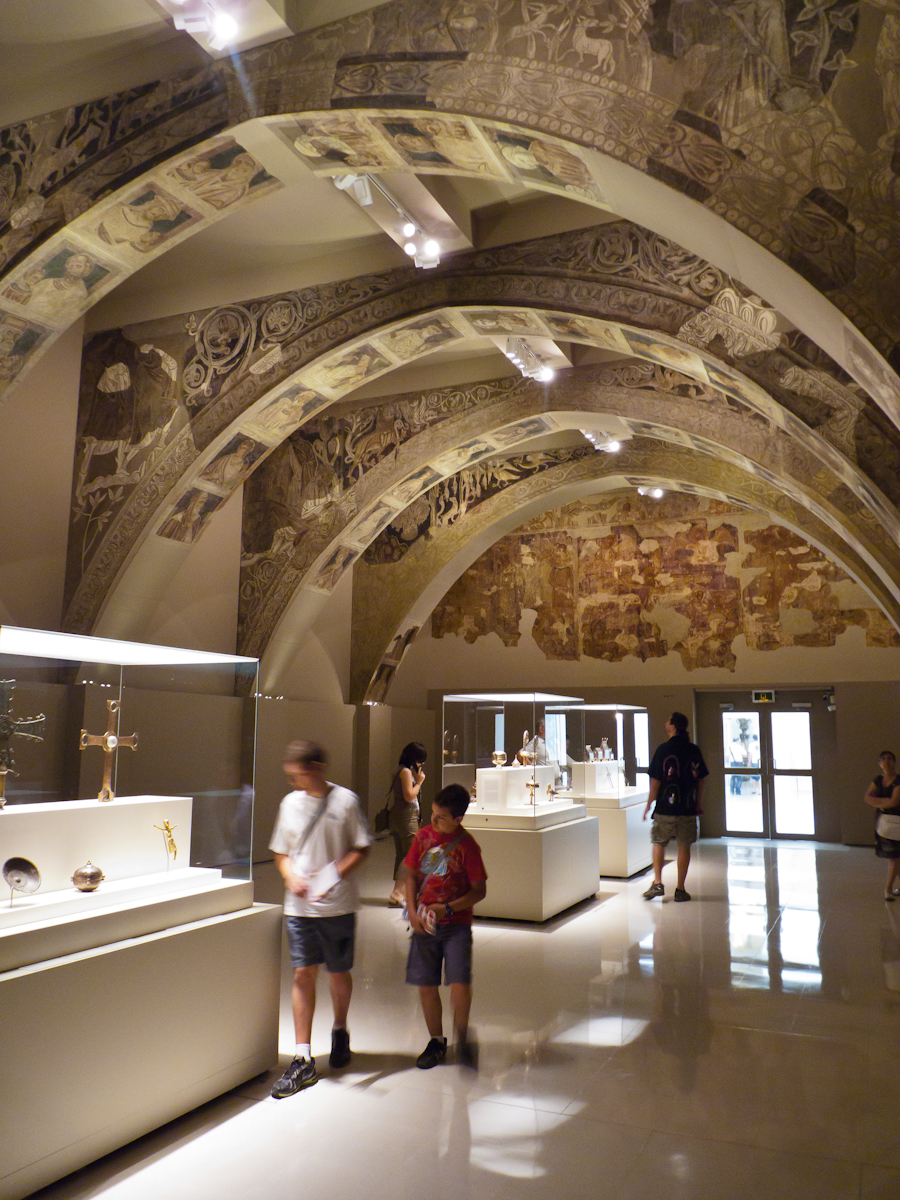 Barcelona Romanico 939 05 de julio de 2011